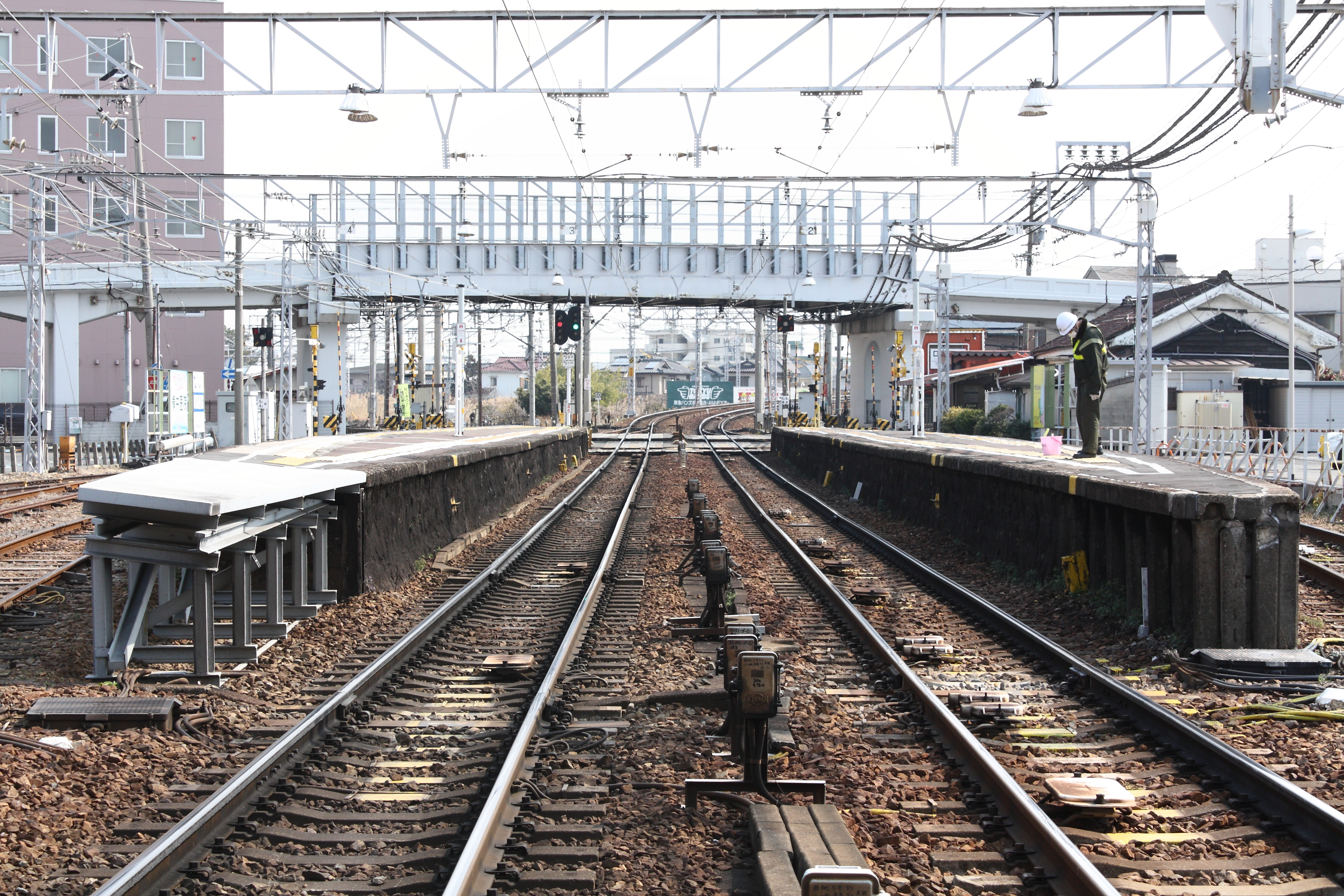 名古屋鉄道名古屋本線 西枇杷島駅 西側からホームを撮影